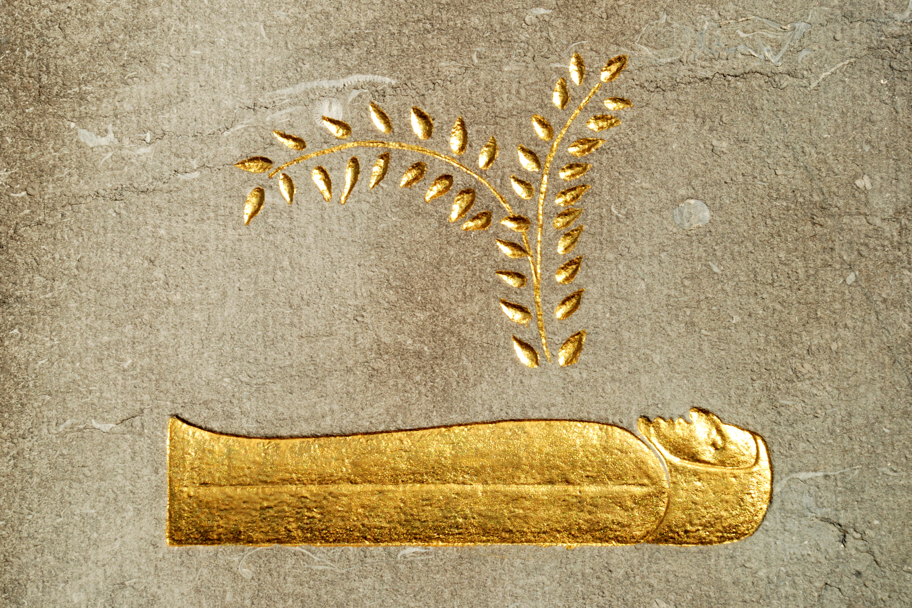 Belgique - Brabant wallon - Court-Saint-Etienne - Mausolée Goblet d'Alviella - Symbole de la vie